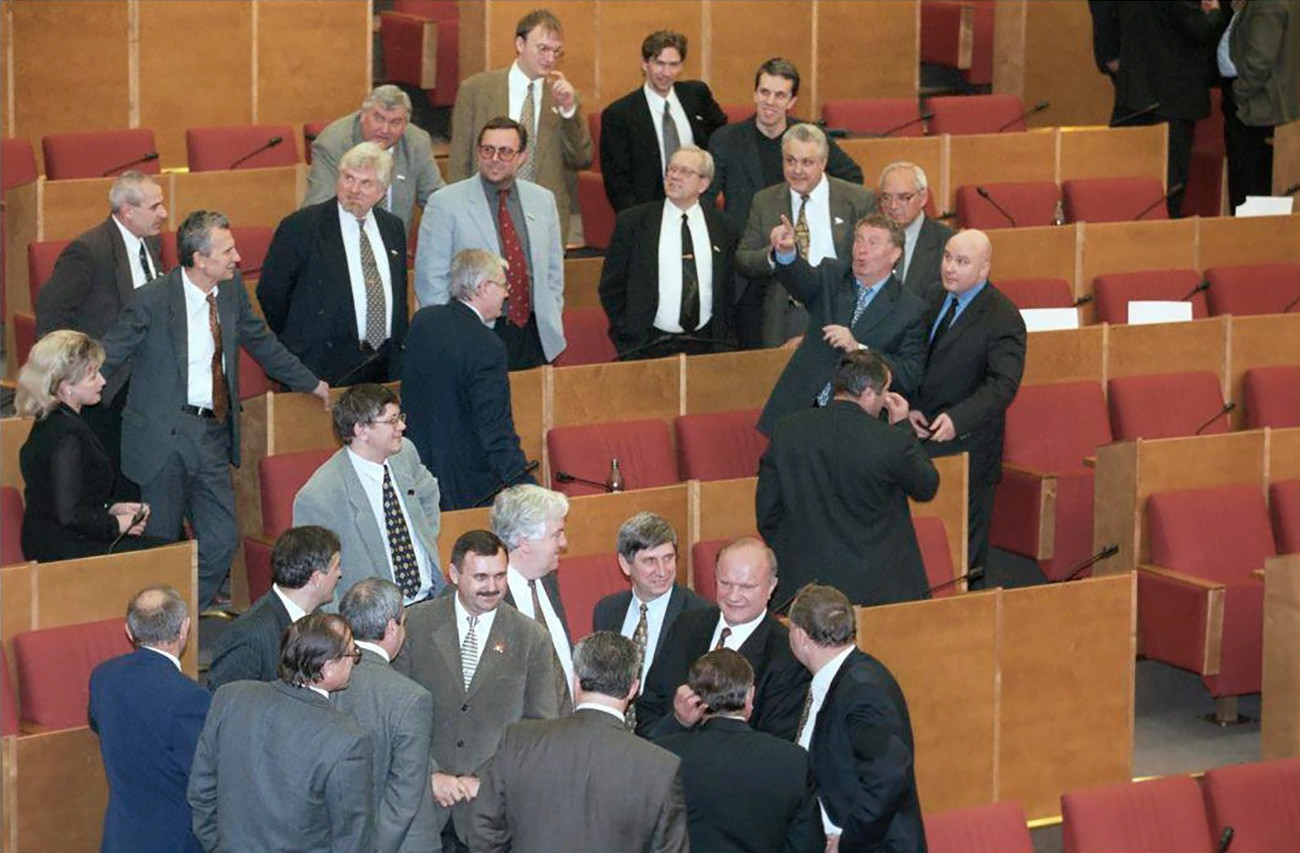 Депутаты-члены фракций КПРФ и ЛДПР в Государственной Думы во время рассмотрения на пленарном заседании вопроса об импичменте Президенту России Б.Н.Ельцину. 15 мая 1999г. фото В.Ф.Федоренко